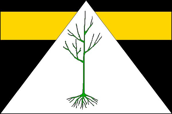 Vlajka obce Vanovice